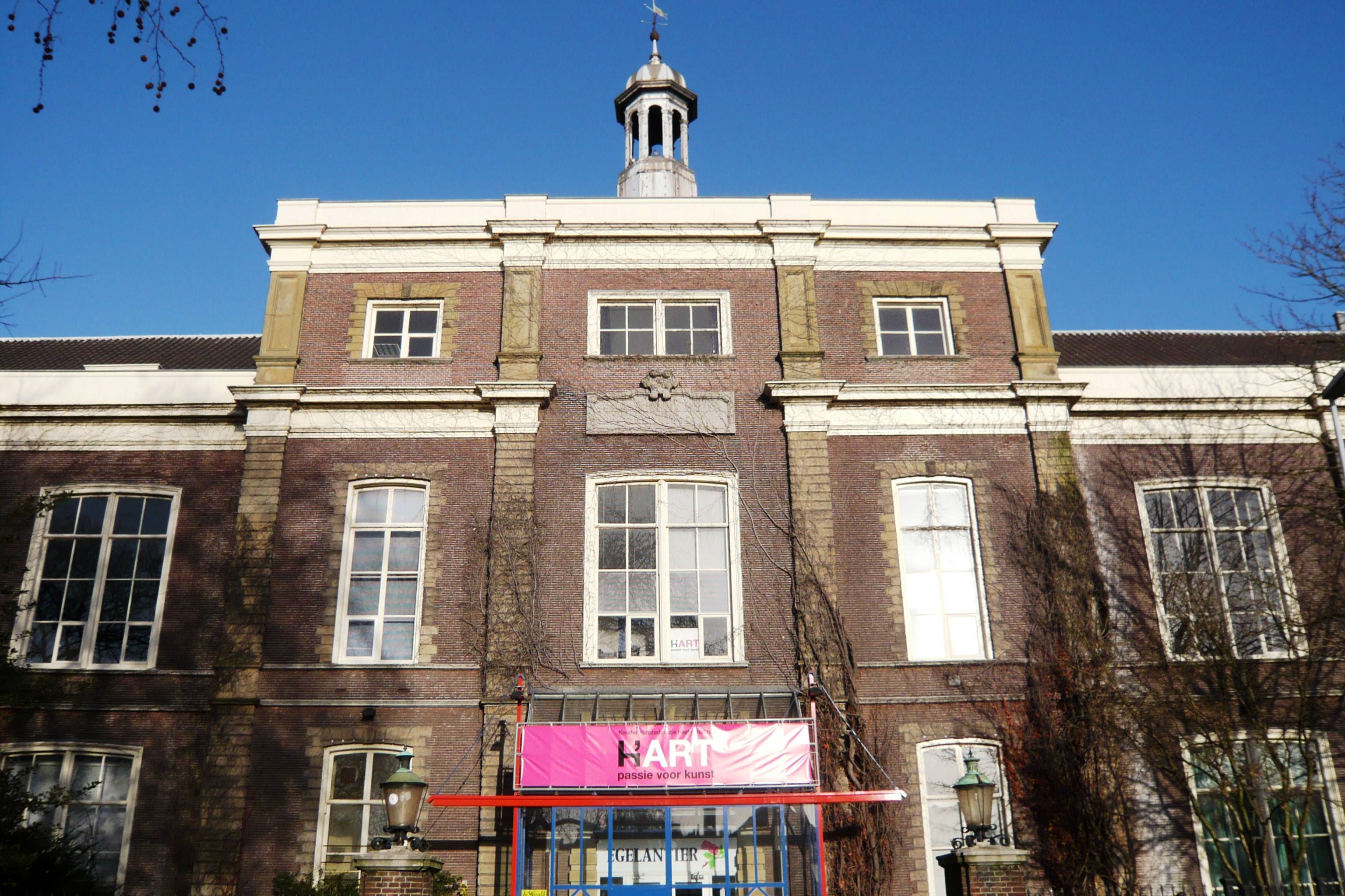 Egelantier. Vormalige Elisabeth Gasthuis, Gasthuisvest 47, Haarlem.